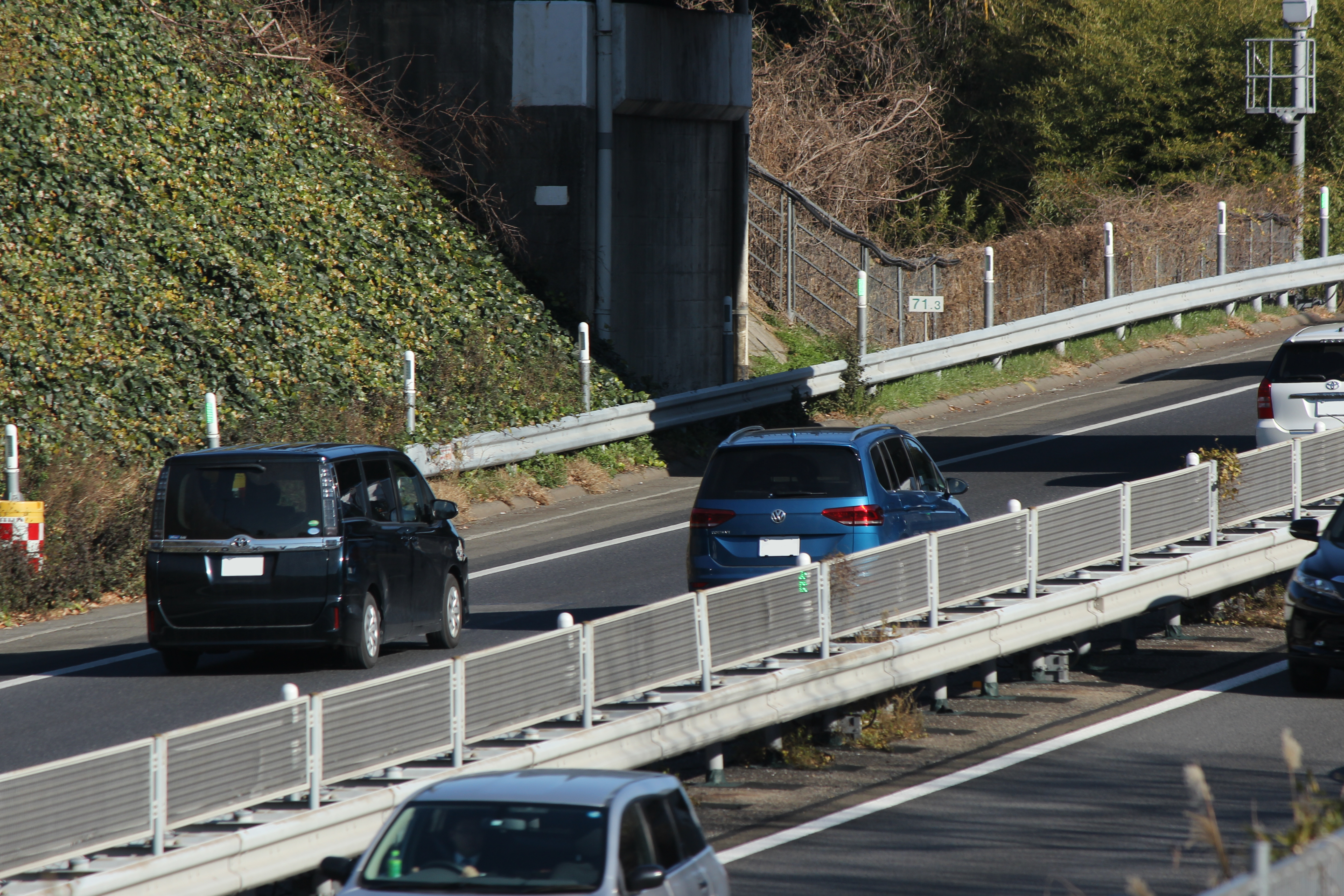 E23東名阪自動車道に設置されたドライブアシストライト（鈴鹿インターチェンジ付近）